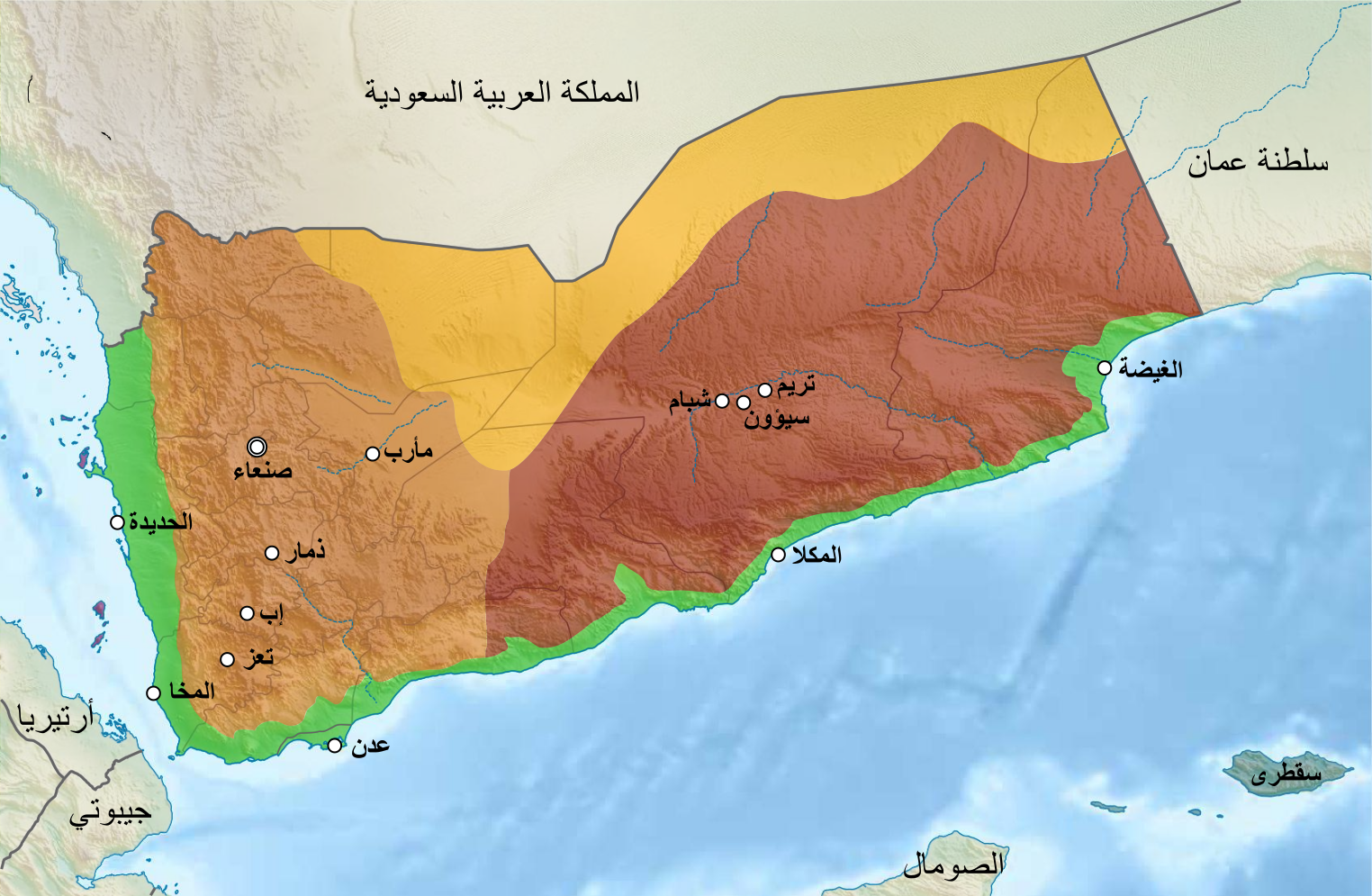 خريطة اليمن لويكي رحلات.